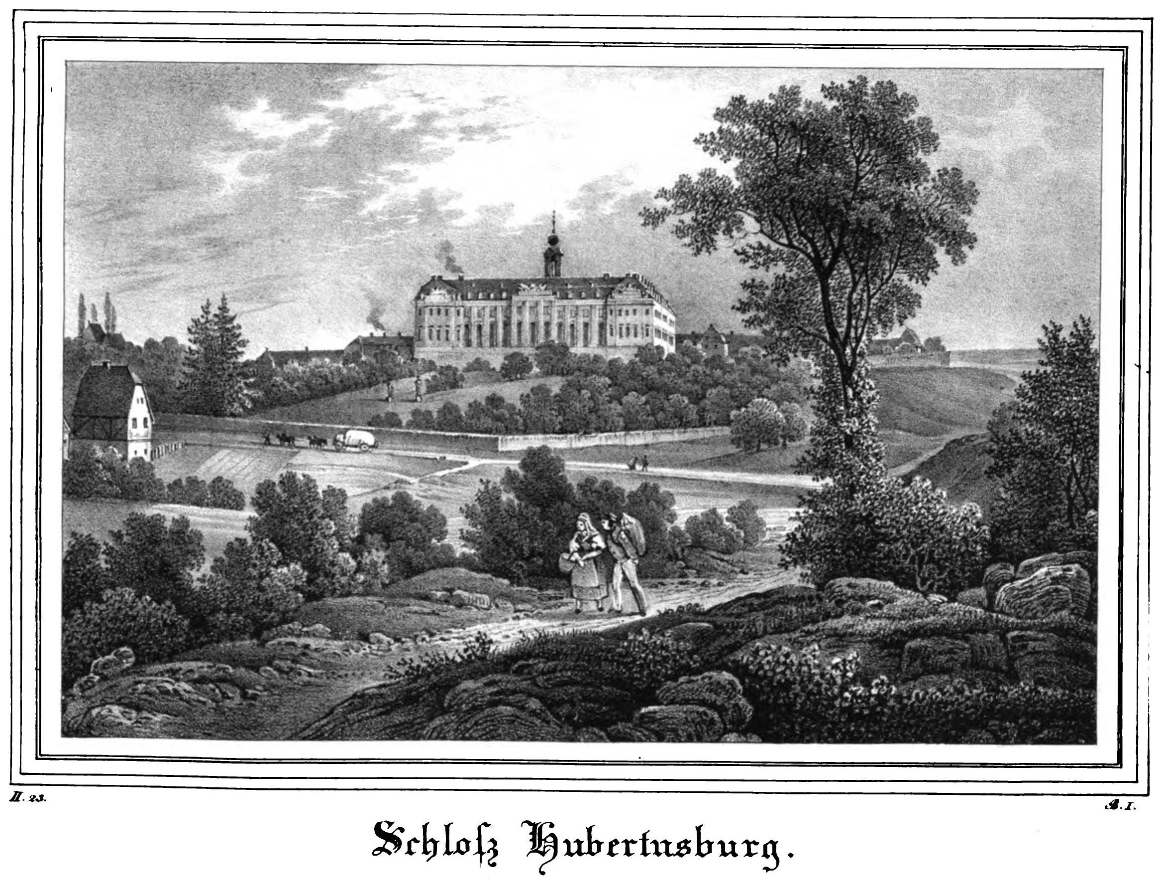 Saxonia Museum für saechsische Vaterlandskunde. Band 2. Dresden: Pietzsch und Comp. Siehe File:Saxonia Museum für saechsische Vaterlandskunde II.djvu